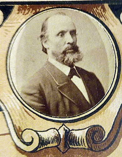 Heinrich Konrad Schneider (1828-1898), Agrarwissenschaftler, sowie Gründer und Leiter der Akademie für Bierbrauer und Landwirte, Worms. Geboren in Trais-Horloff.